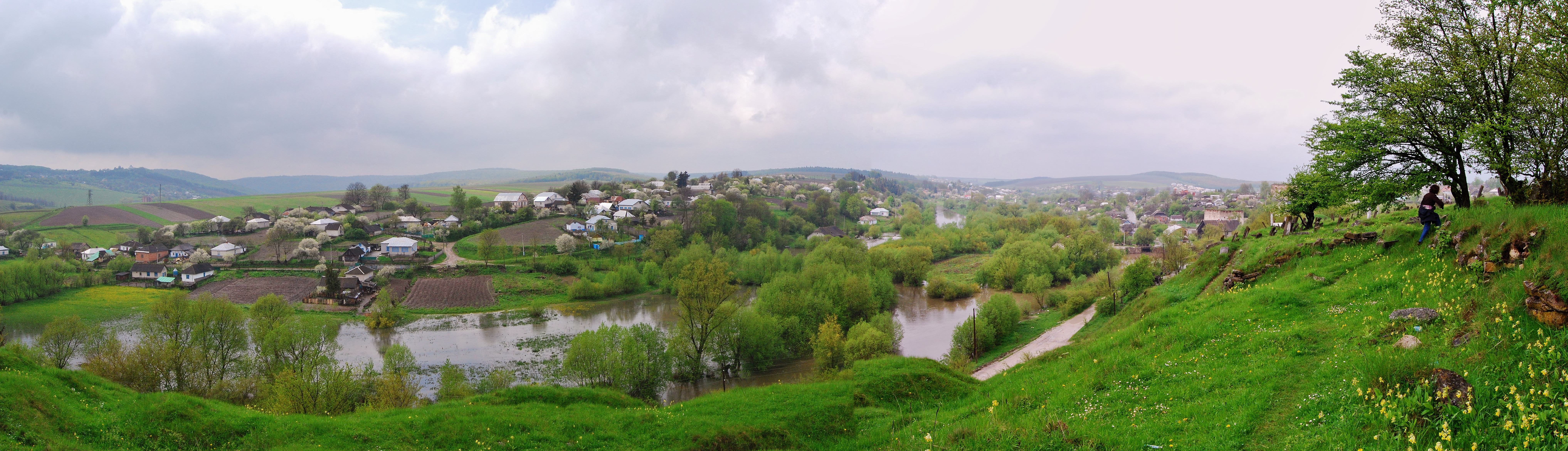 Краєвид на річку Збруч та сусіднє село Калагарівку з єврейського цвинтаря в Сатанові Городоцького району Хмельницької області